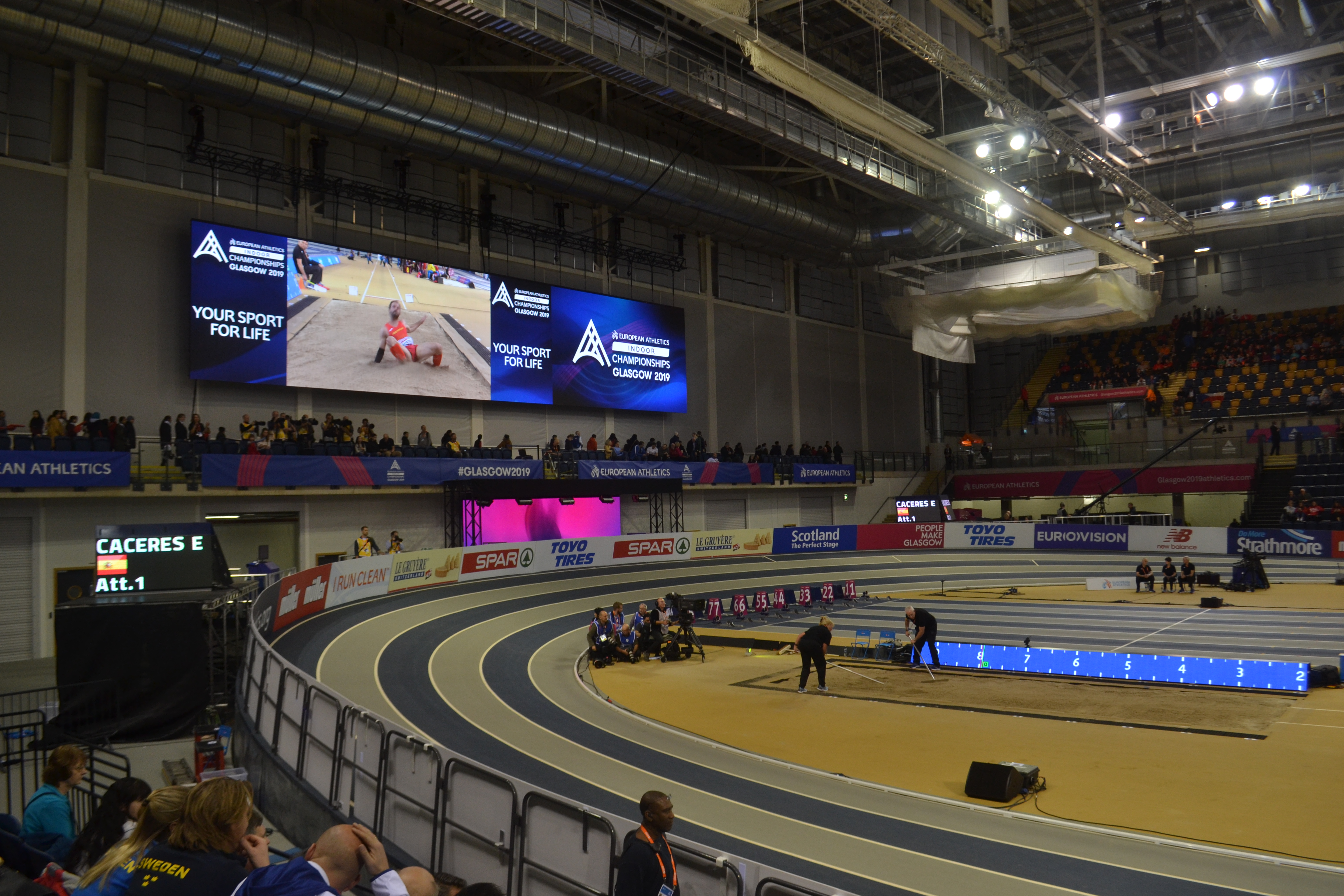 Emirates Arena, Glasgow